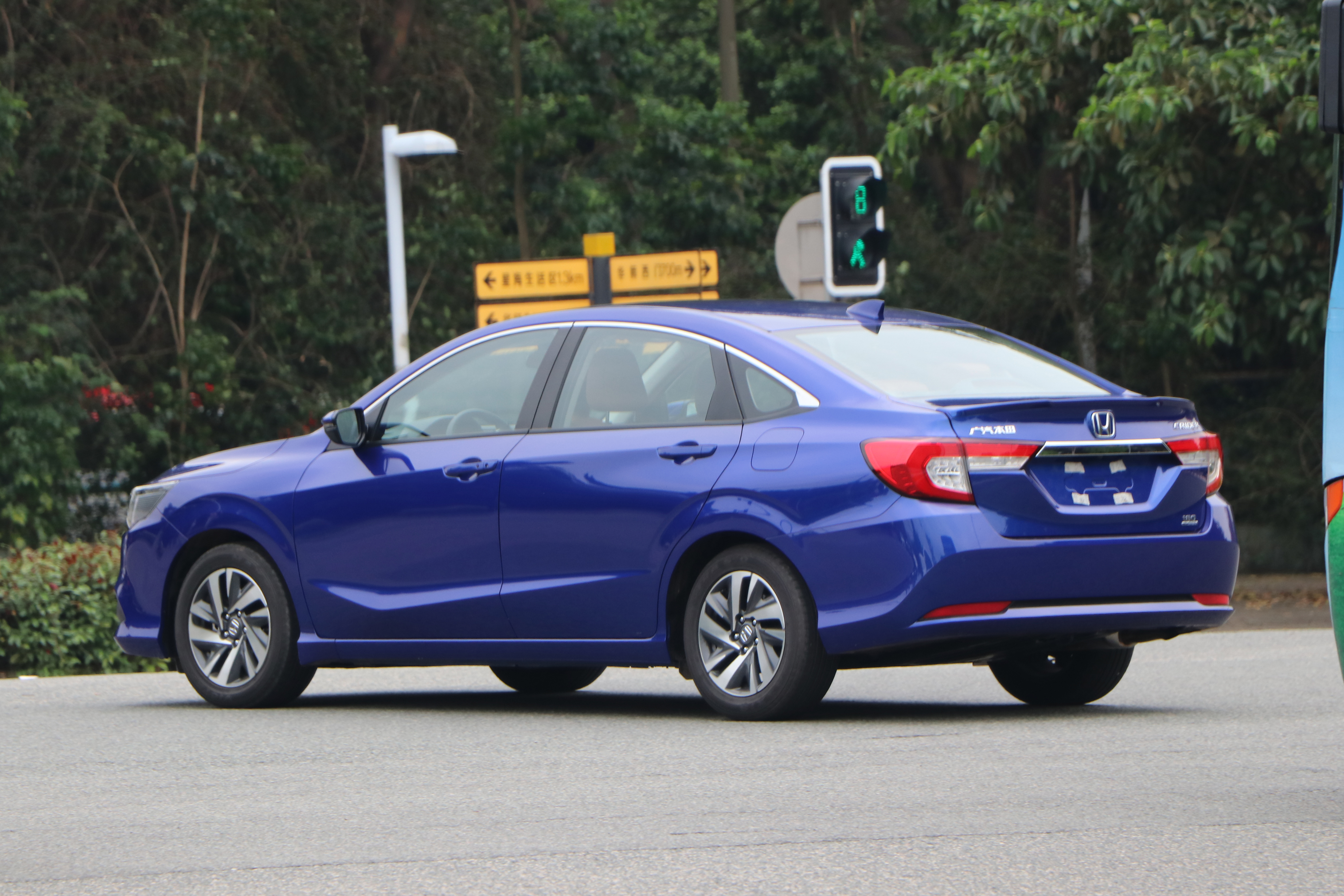 广汽本田凌派